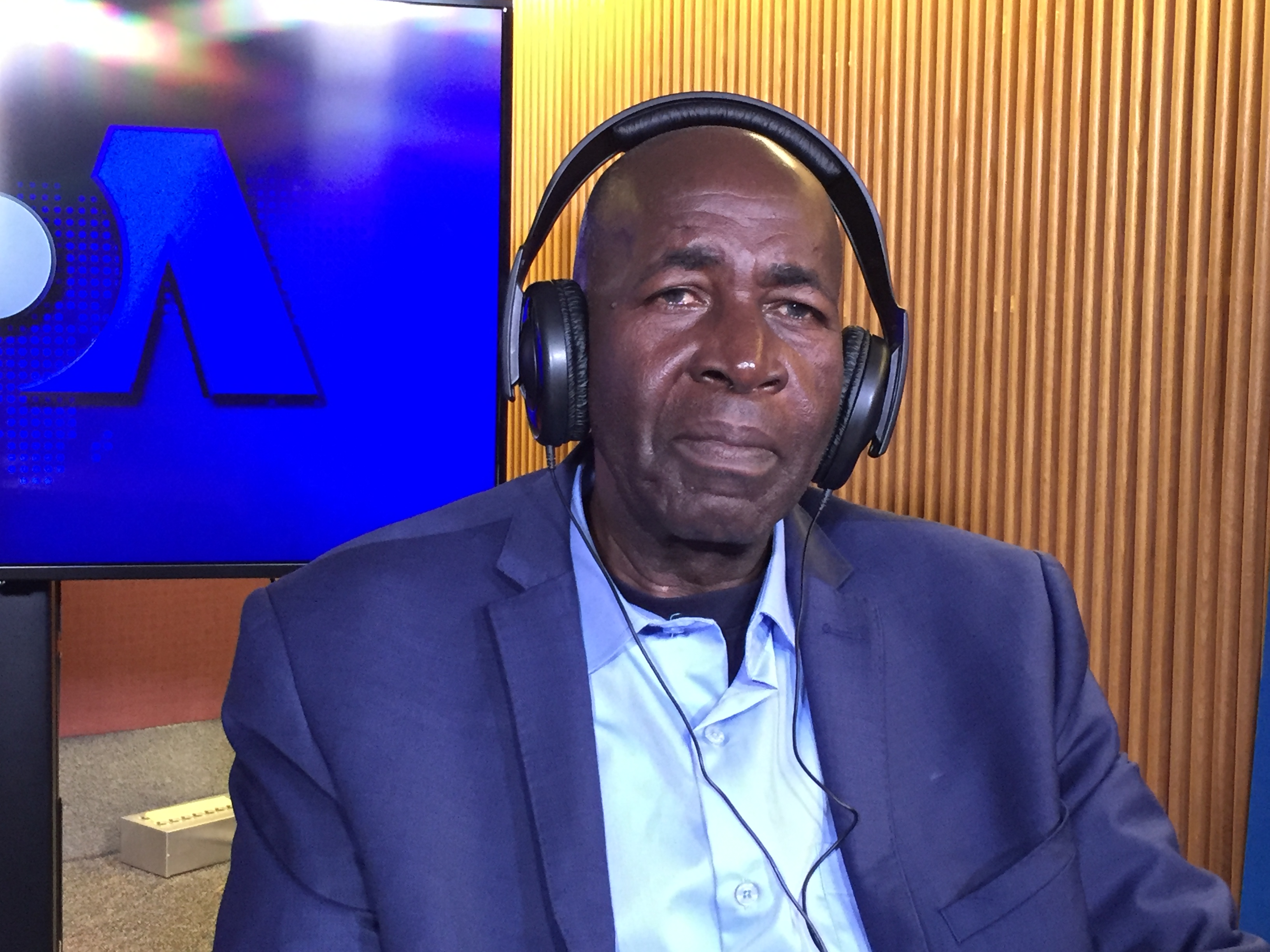 ierre Claver Mbonimpa dans les studios de VOA, Washington, le 23 octobre 2017 (VOA/Nicolas Pinault)